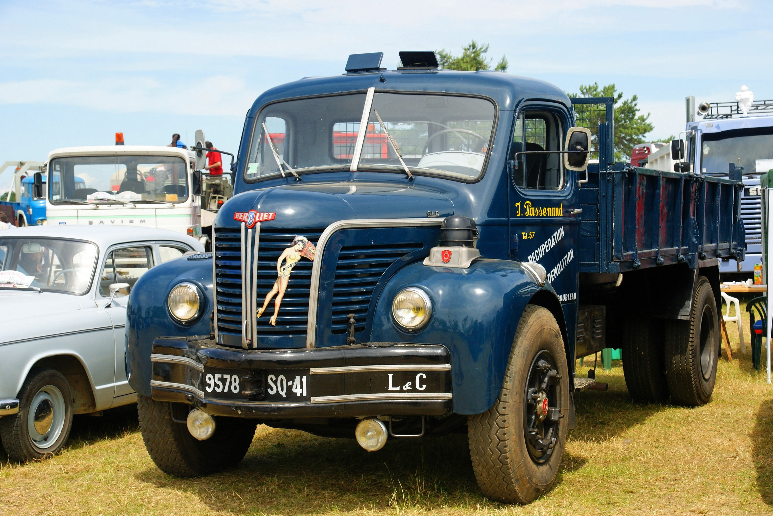 un ancien camion vu à la Locomotion en fête .